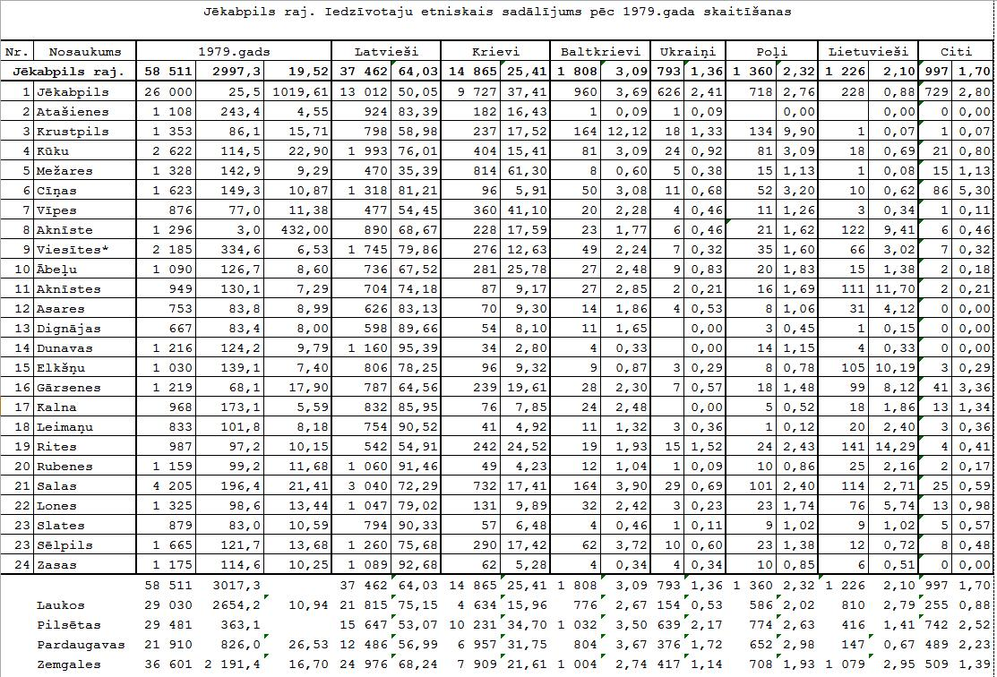 Latvijas 1979. gada tautas skaitīšanas dati